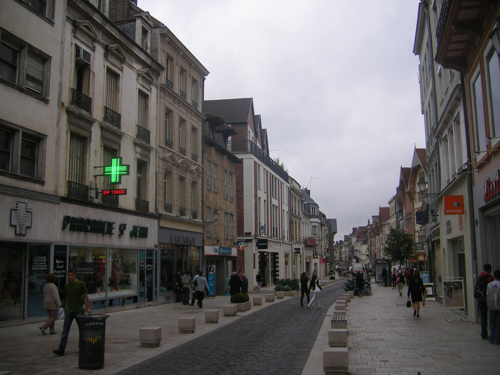 Une rue de Troyes.